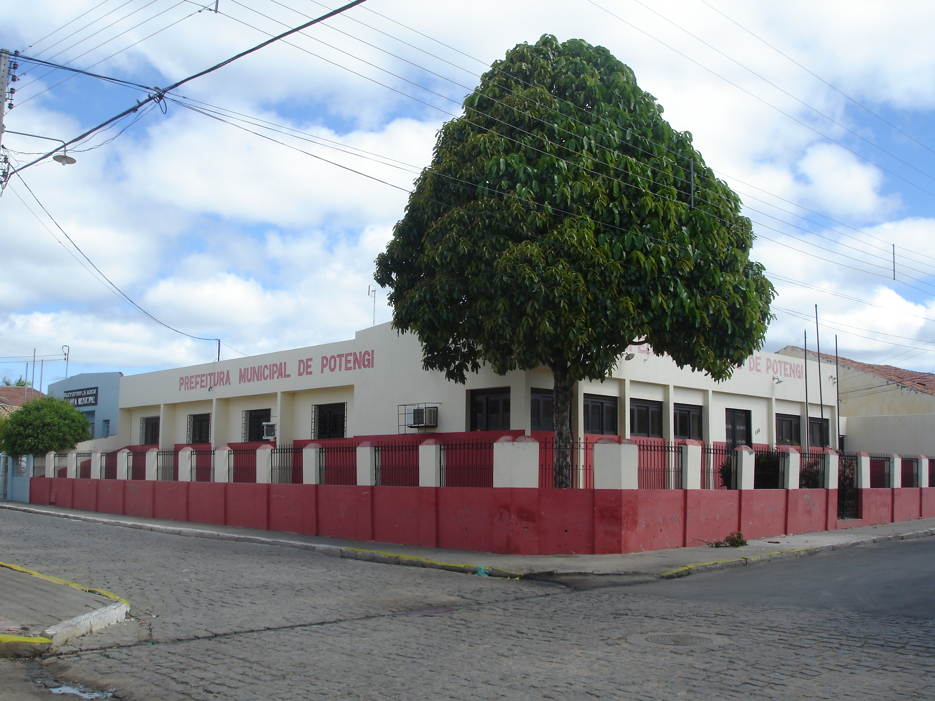 Prefeitura